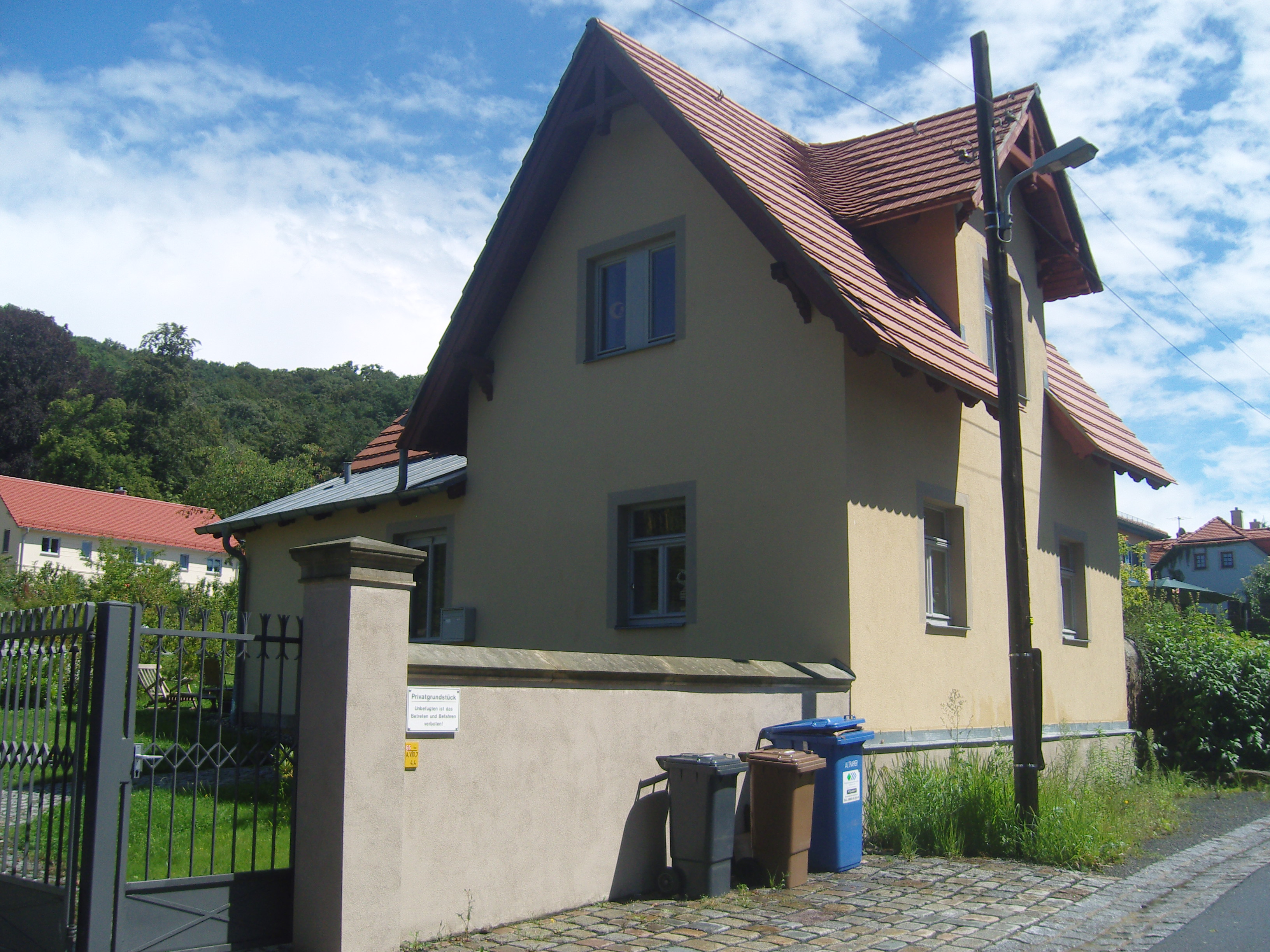 Denkmalgeschütztes Torhaus des Keppschloss in der Dresdner Straße 97 in Dresden